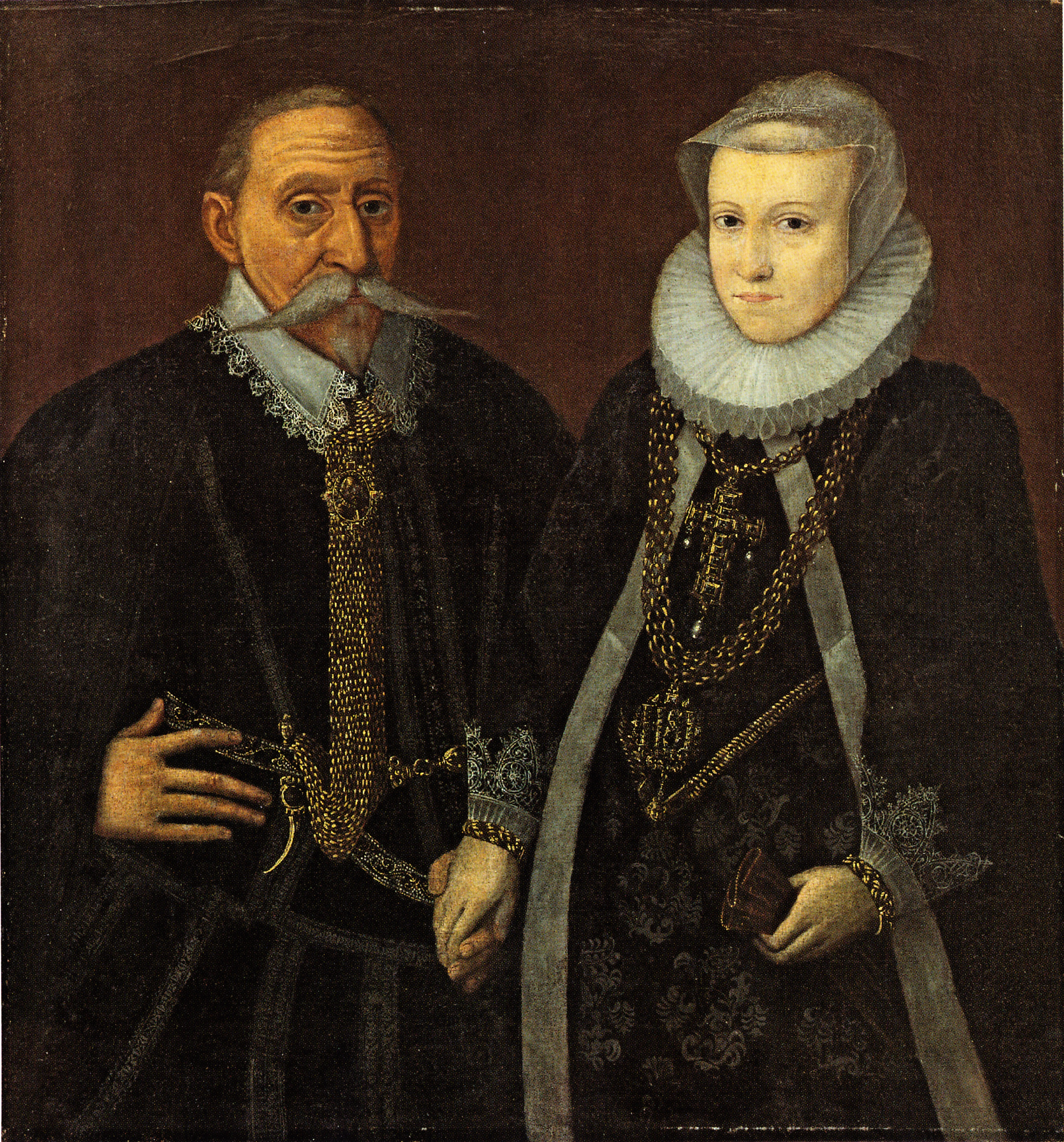 Ölgemälde von Herzog Bogislaw XIII. von Pommern und seiner Gemahlin Anna von Schleswig-Holstein-Sonderburg